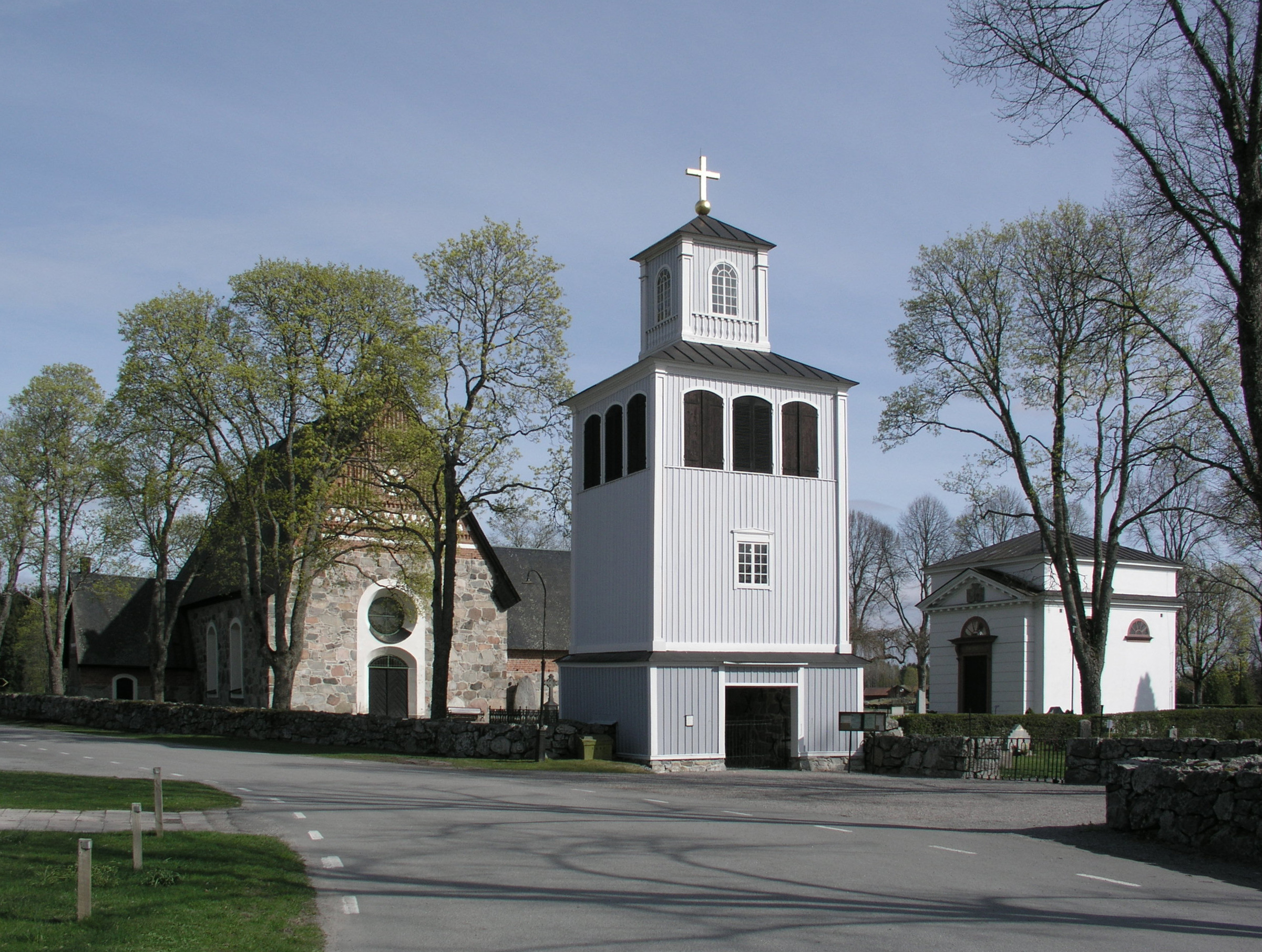 Rimbo kyrka, Diocese of Uppsala, Norrtälje kommun